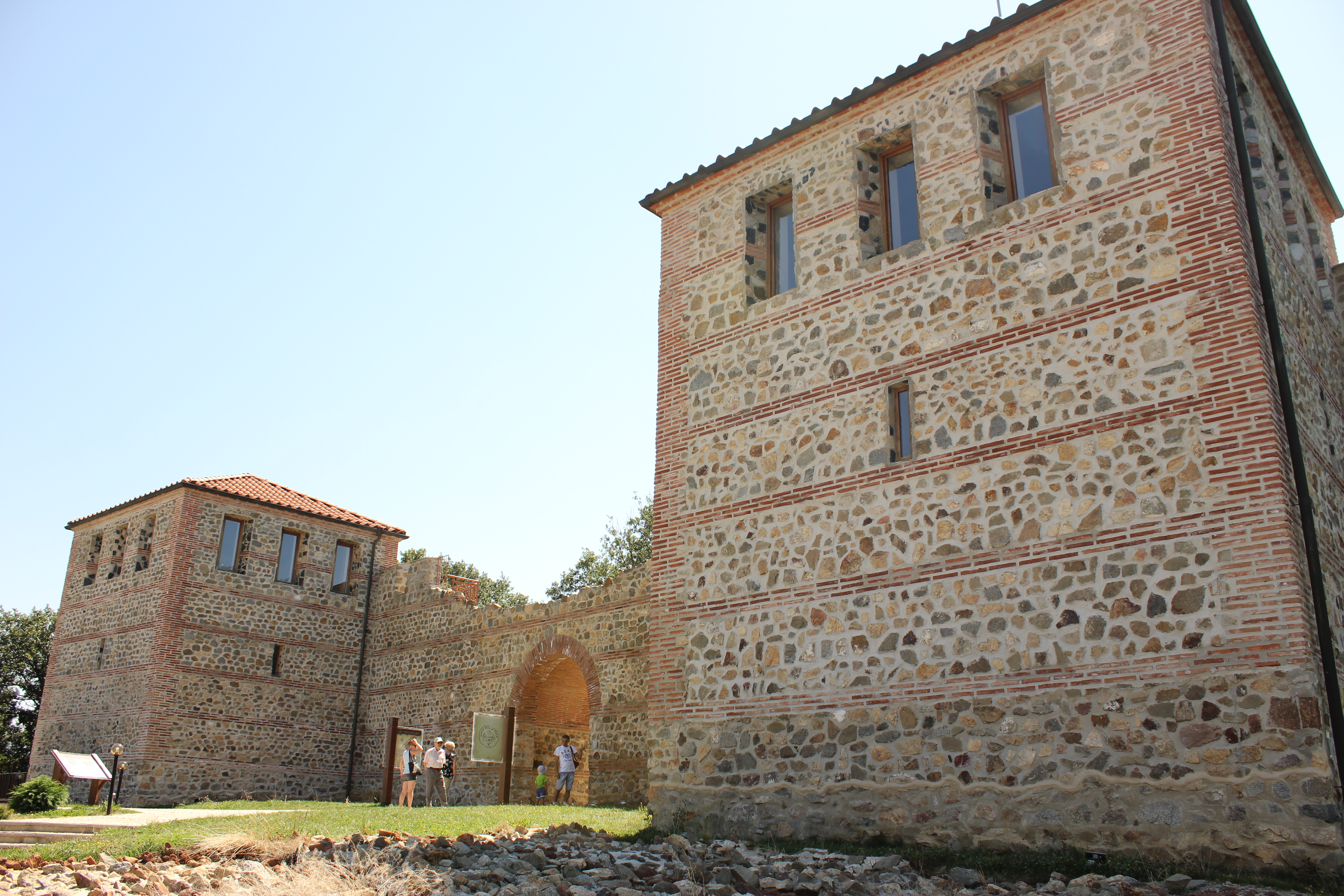 Крепост „Цари Мали град“, Белчин